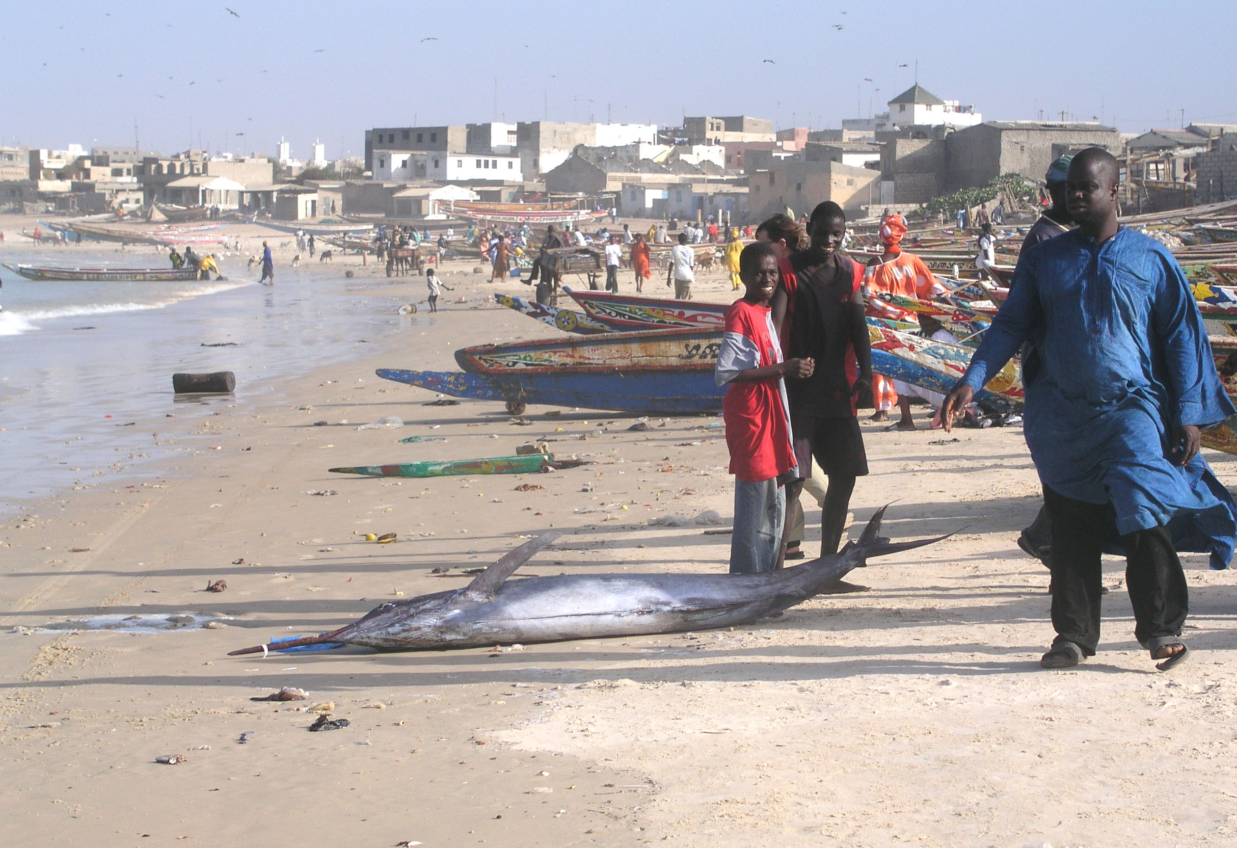 Espadon sur une plage de Yoff (près de Dakar, Sénégal)